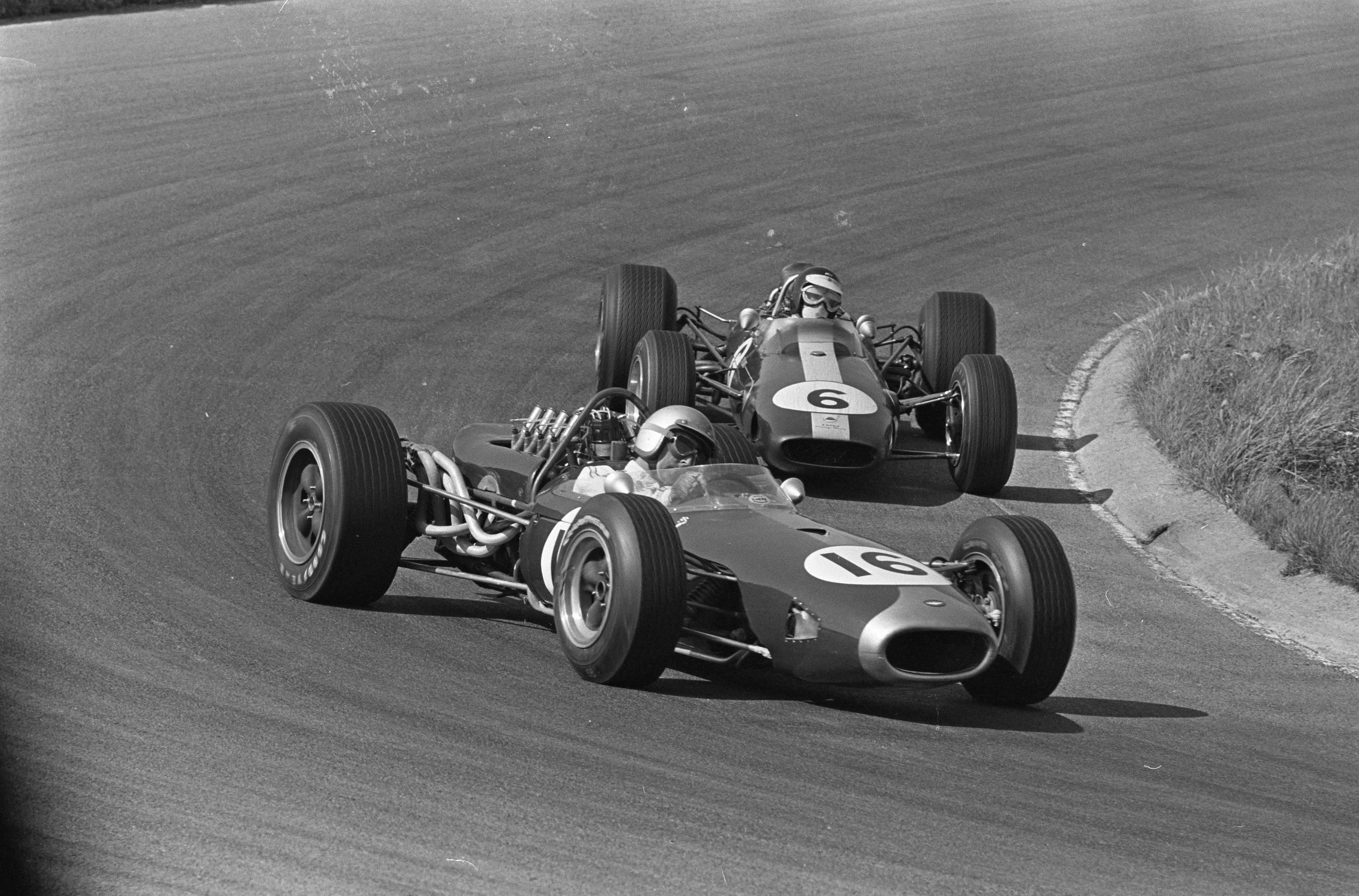 Collectie / Archief : Fotocollectie Anefo Reportage / Serie : [ onbekend ] Beschrijving : Grand Prix te Zandvoort, Jack Brabham in duel met Jim Clark (rechts) Datum : 24 juli 1966 Locatie : Noord-Holland, Zandvoort Persoonsnaam : Brabham, Jack, Clark, Jim Fotograaf : Koch, Eric / Anefo Auteursrechthebbende : Nationaal Archief Materiaalsoort : Negatief (zwart/wit) Nummer archiefinventaris : bekijk toegang 2.24.01.05 Bestanddeelnummer : 919-3861